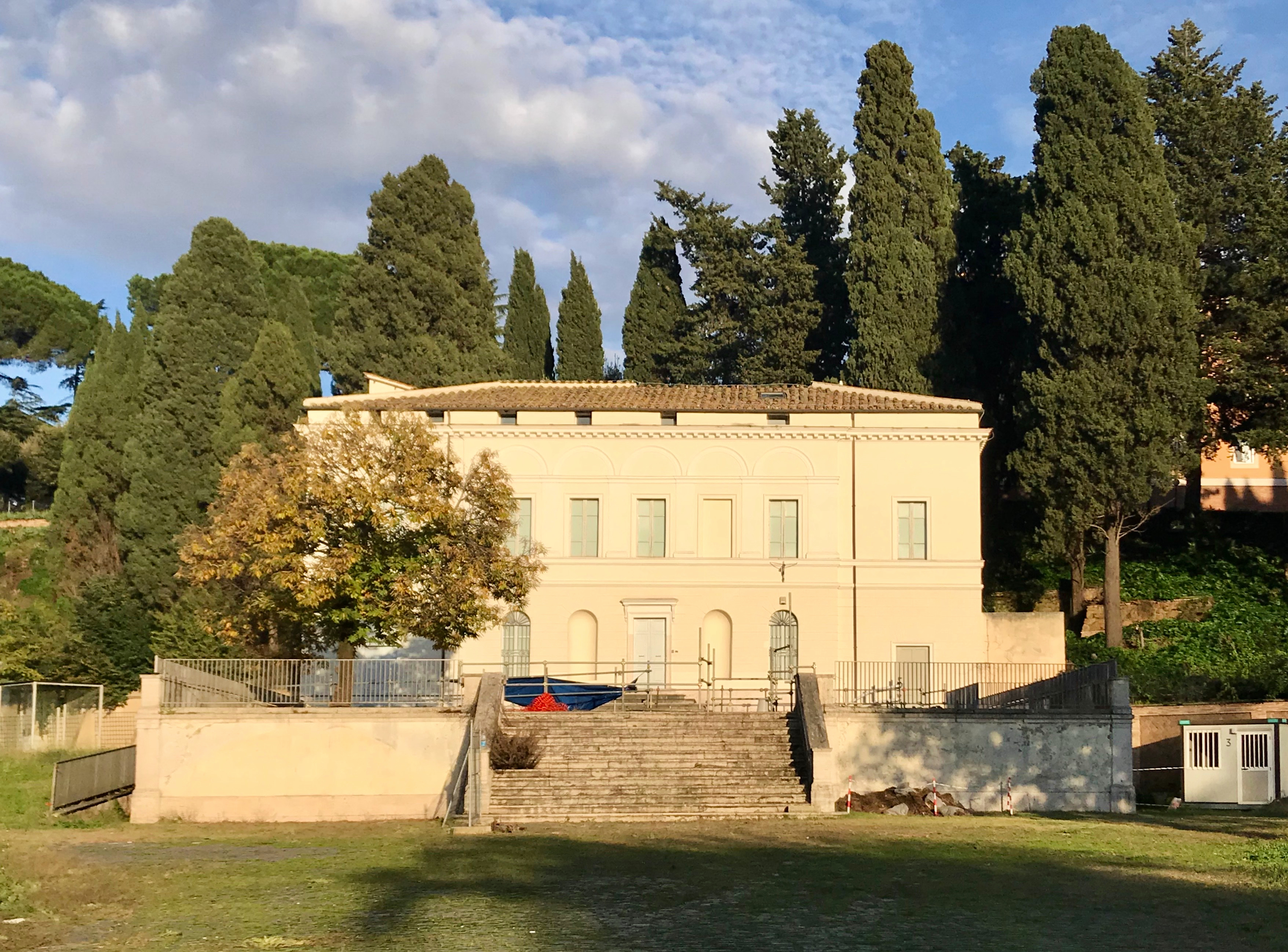 Casino del Salvi in Rome